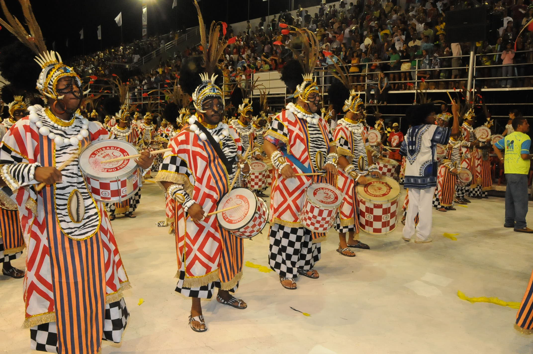 Samba school MUG on parade 2009, Vitória, Brazil.